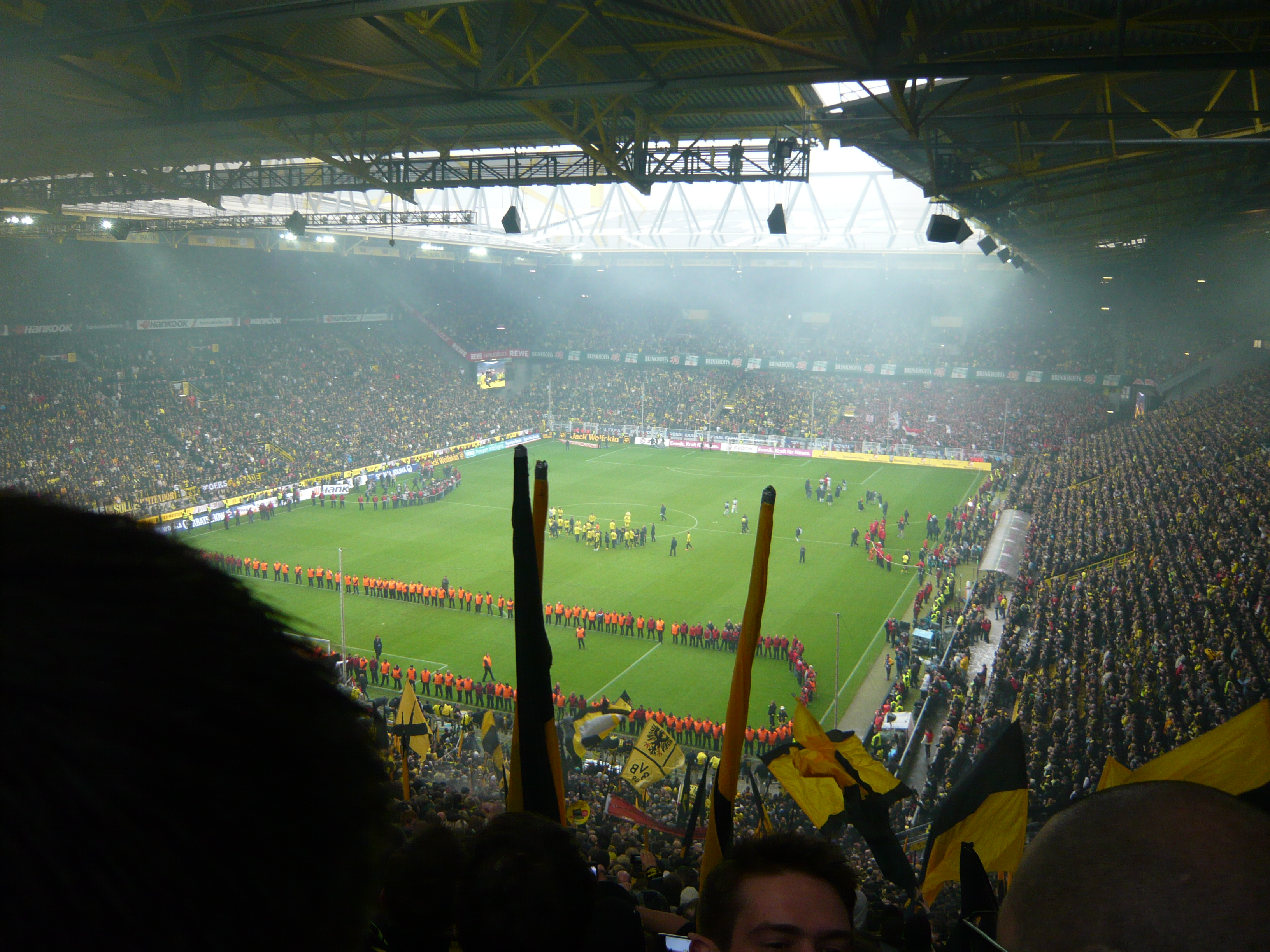 Ordner sichern den Platz des Signal Iduna Park nach Abpfiff des Spiel Borussia Dortmund gegen SC Freiburg